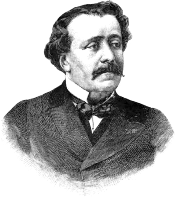 Paul de Saint-Victor (1819 – 1894), French essayist.